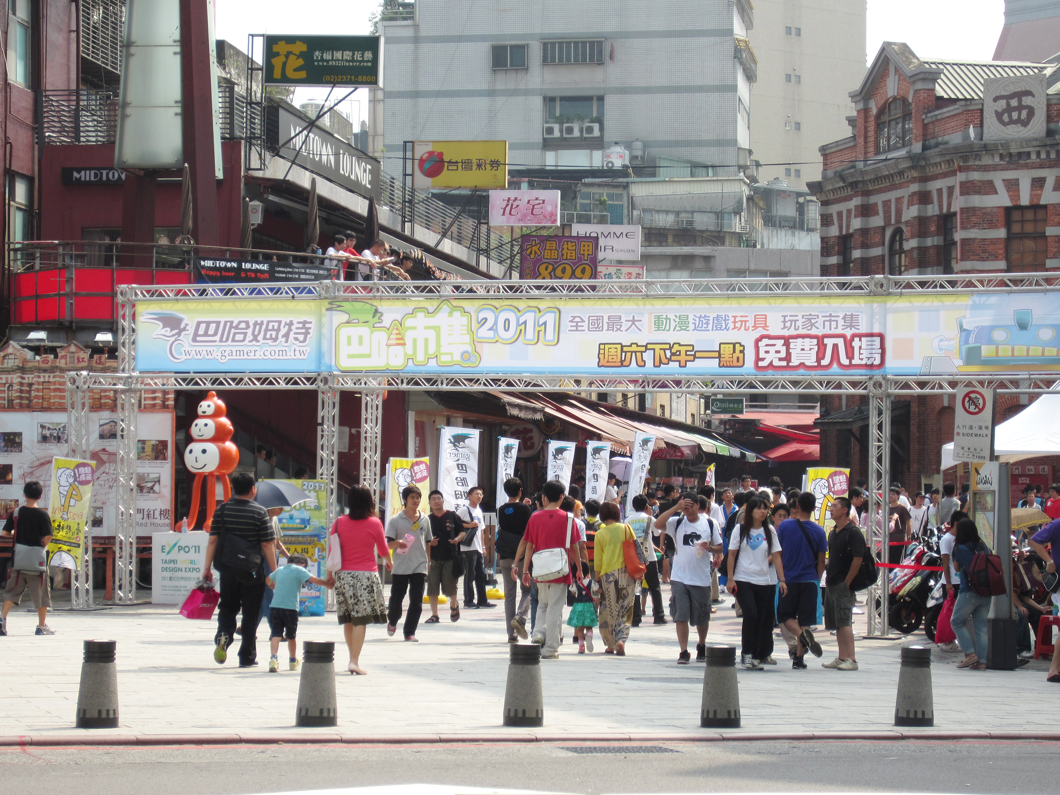 2011巴哈市集入口。